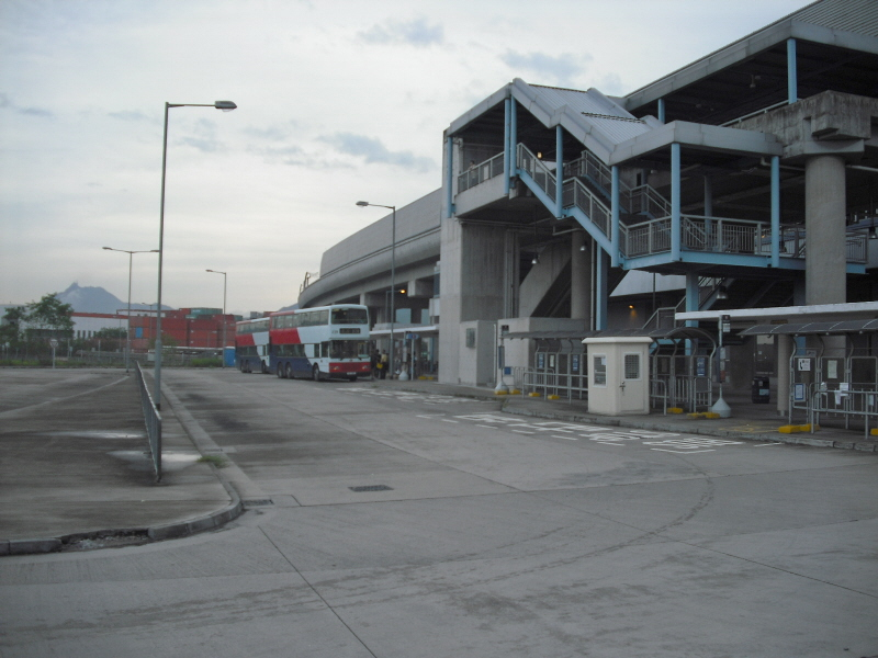 中文（香港）: 天水圍西鐵站巴士總站。